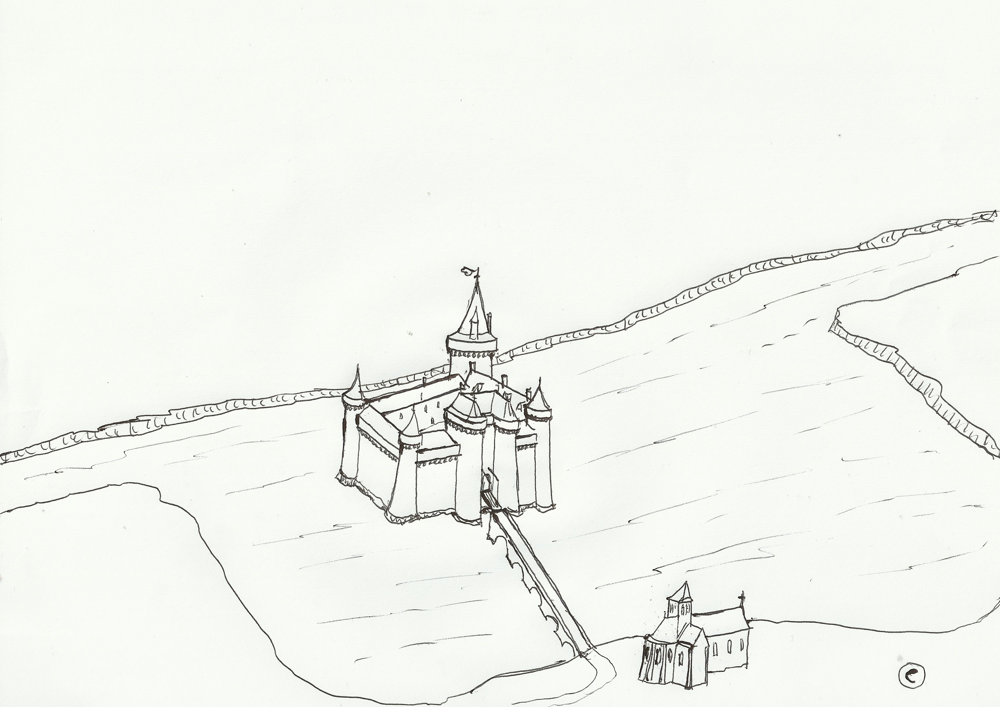 Essai de restitution du château fort de Belleville sur Vie.